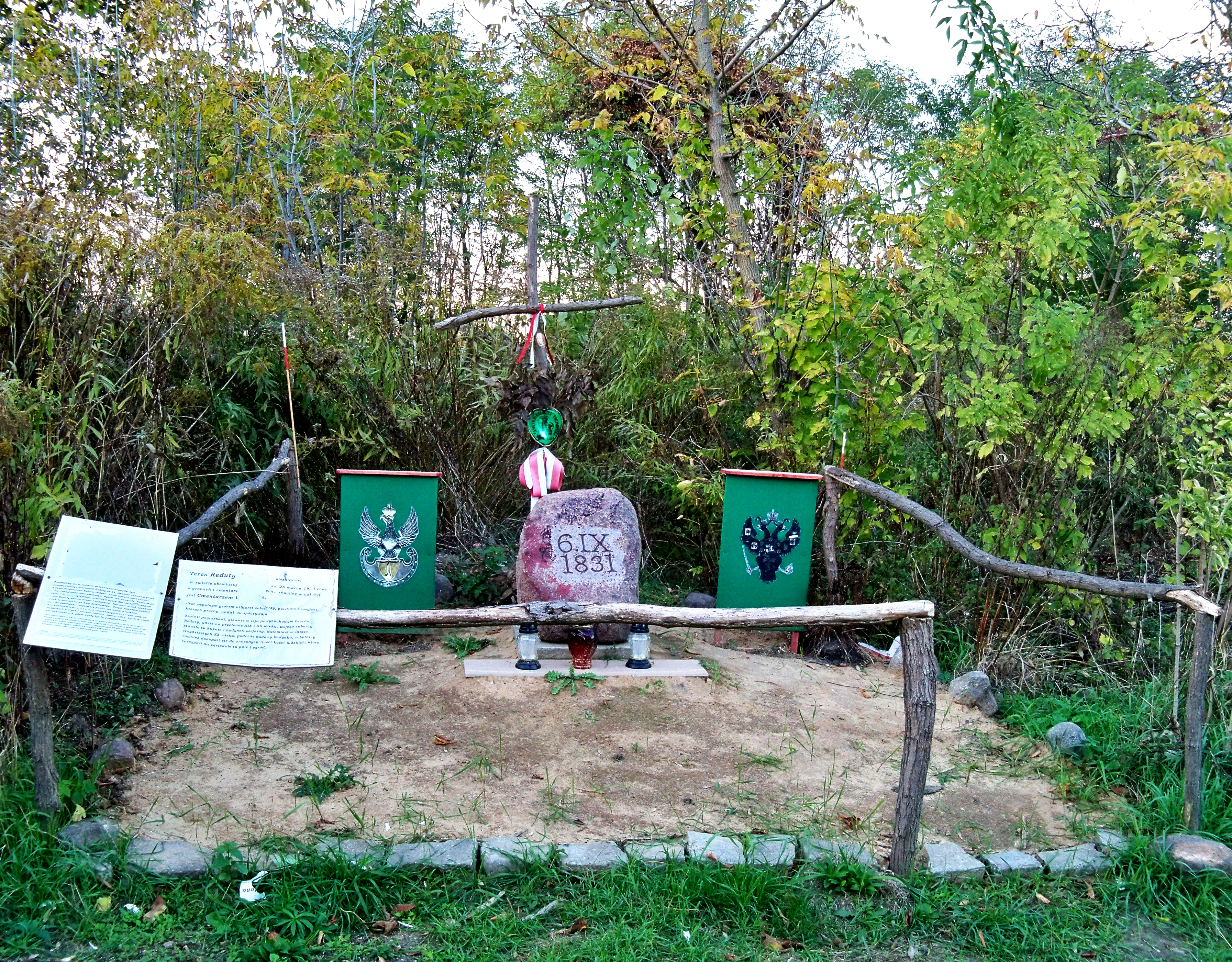 Prawdopodobne miejsce po reducie 54 (Reducie Ordona) w Warszawie. Ulica Na Bateryjce. Spontanicznie wystawiony pomnik-symboliczny grób żołnierzy polskich i rosyjskich.